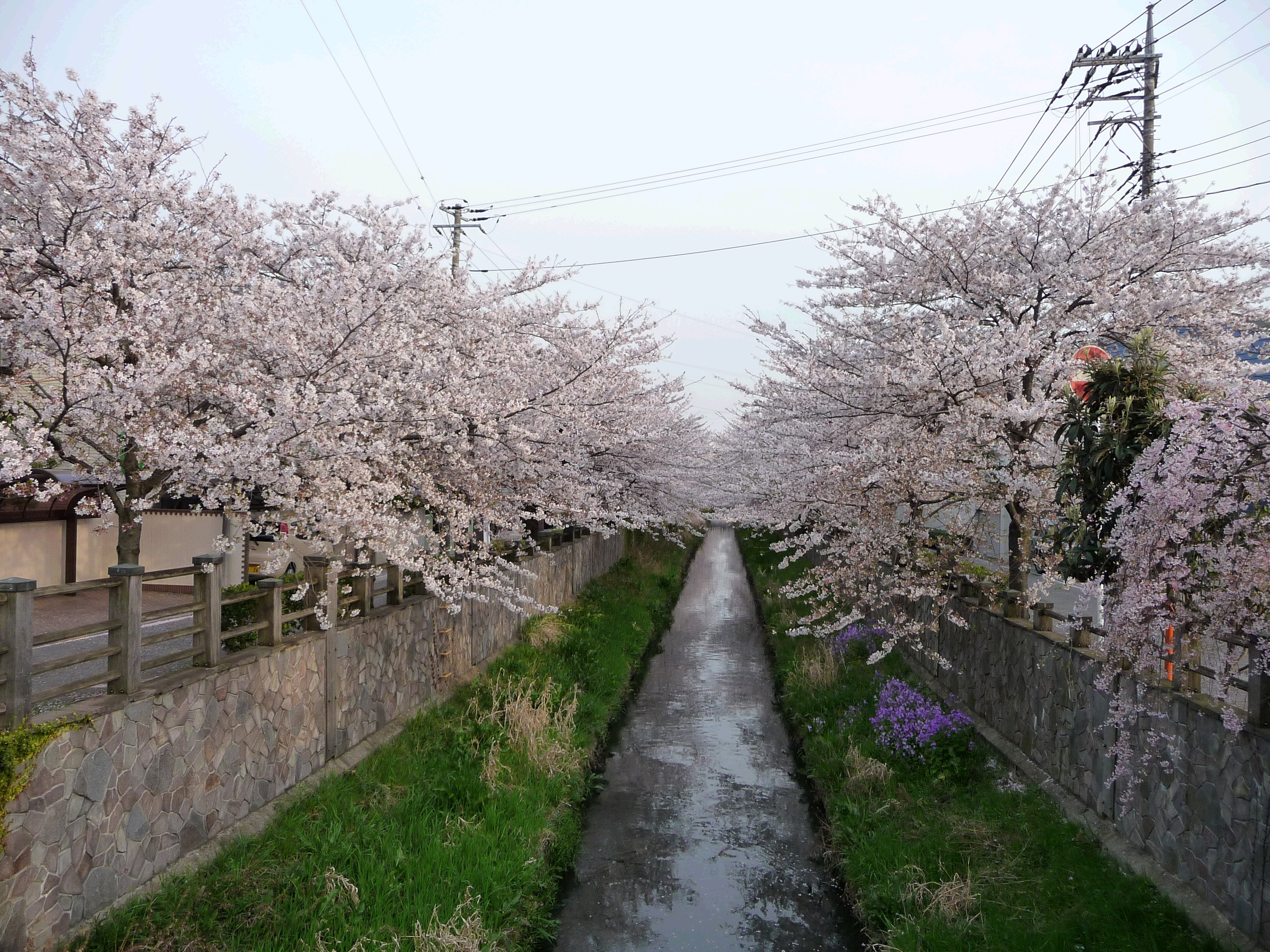 Cherry_Blossom_Mama-gawa_ichikawa_Chiba-Japan.